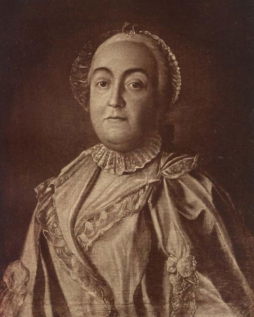 Мария Михайловна Прозоровская, ур.Голицына (1717-1780), жена князя И.А.Прозоровского, их дочь Варвара (1750-1806) была замужем за А.В.Суворовым.